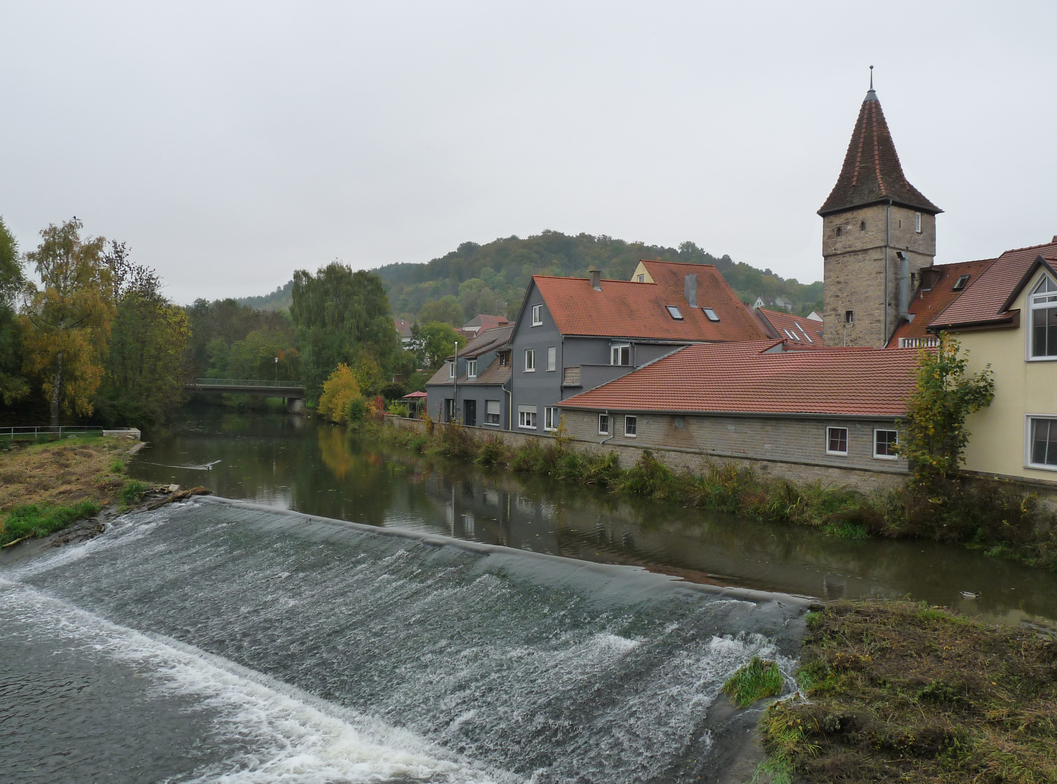 Creglingen (Bade-Wurtemberg, Allemagne).